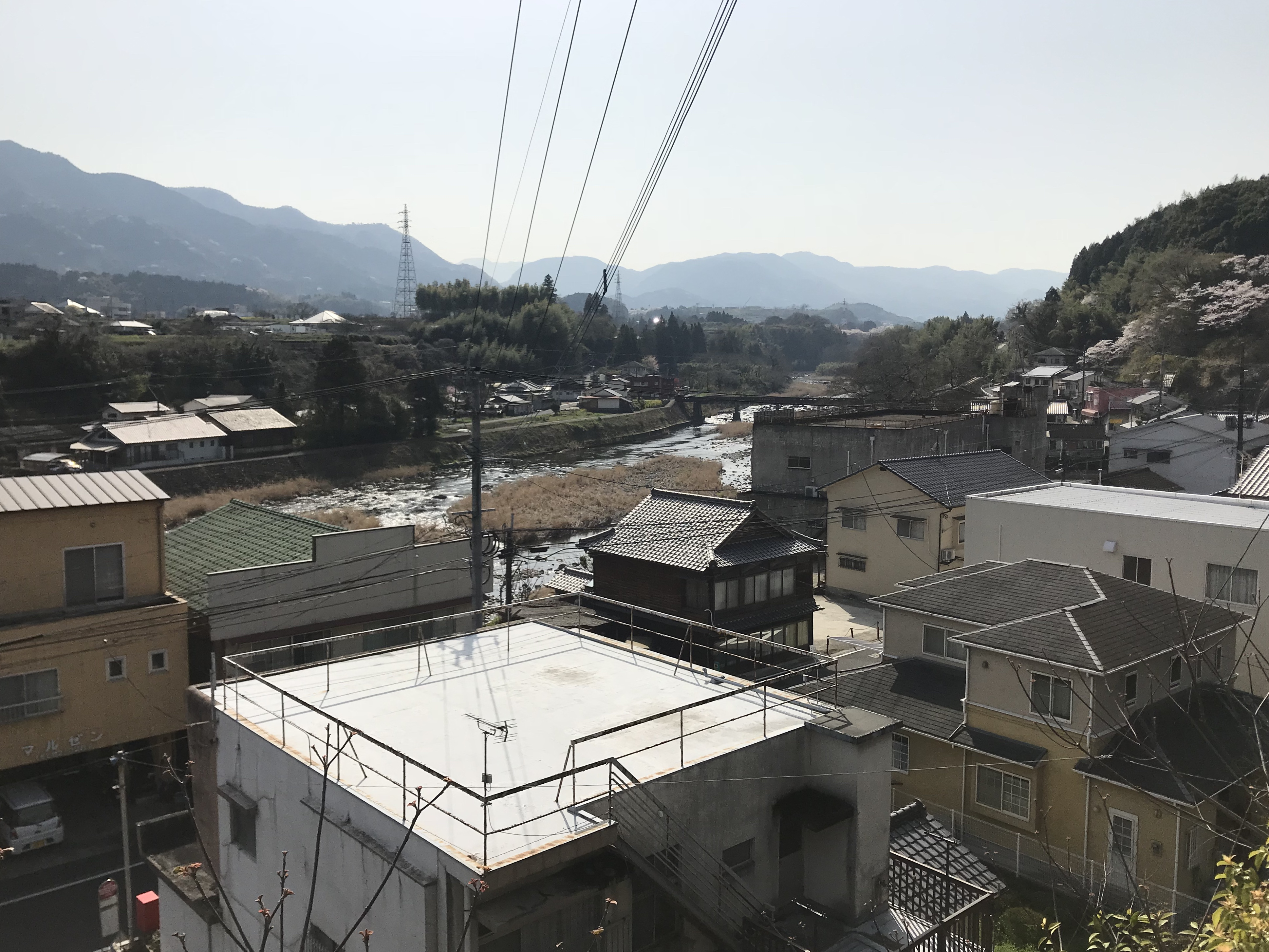 小野屋駅付近より望む大分川(上流側)